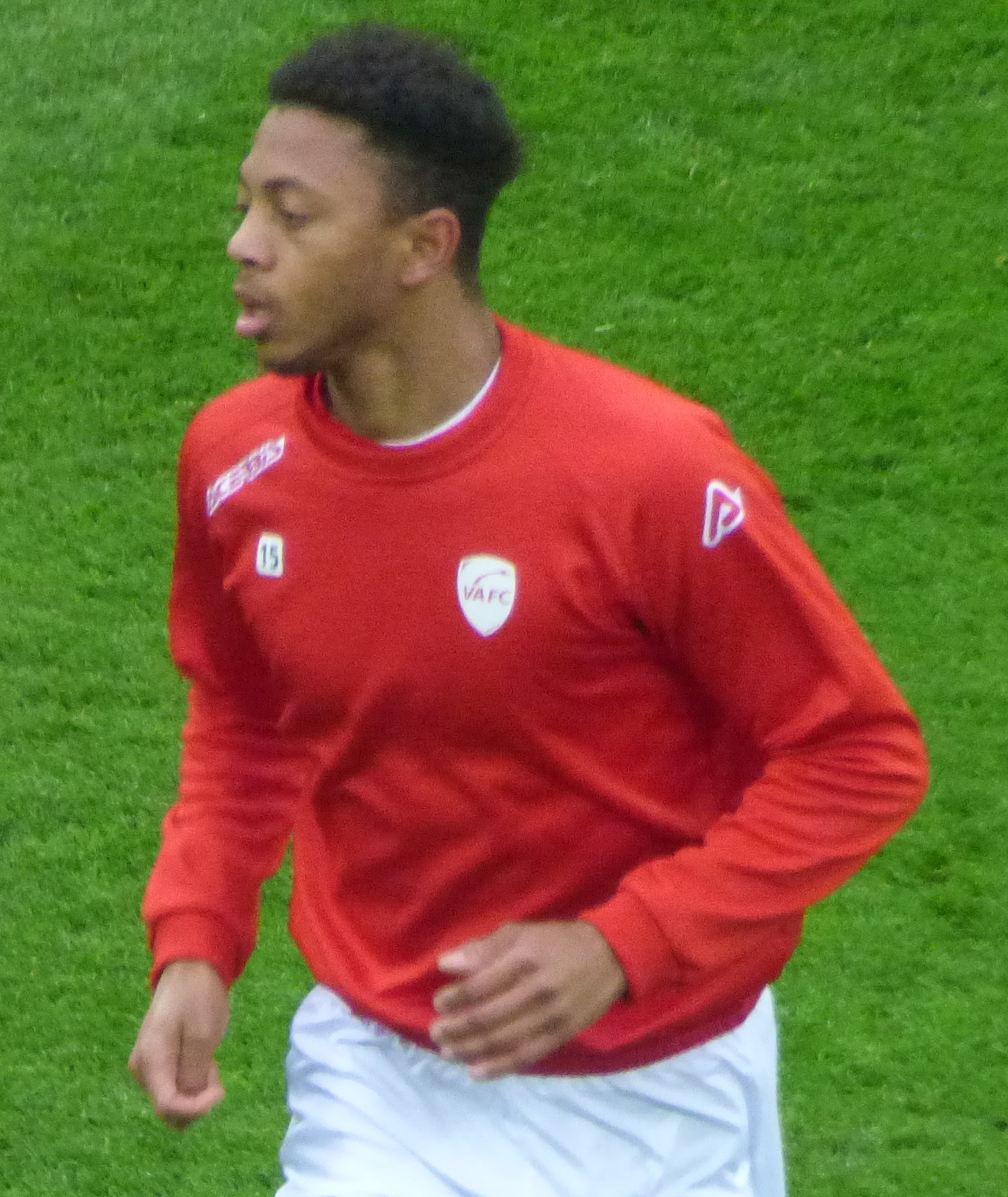 Nathaël Julan avant le match Lens-Valenciennes, comptant pour la 32ème journée du championnat de France de football de Ligue 2 2018-2019, le 12 avril 2019, au Stade Bollaert-Delelis.